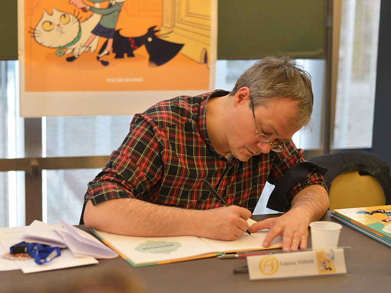 L'auteur de bande dessinée Fabrice Parme en dédicace au Mans, octobre 2015.